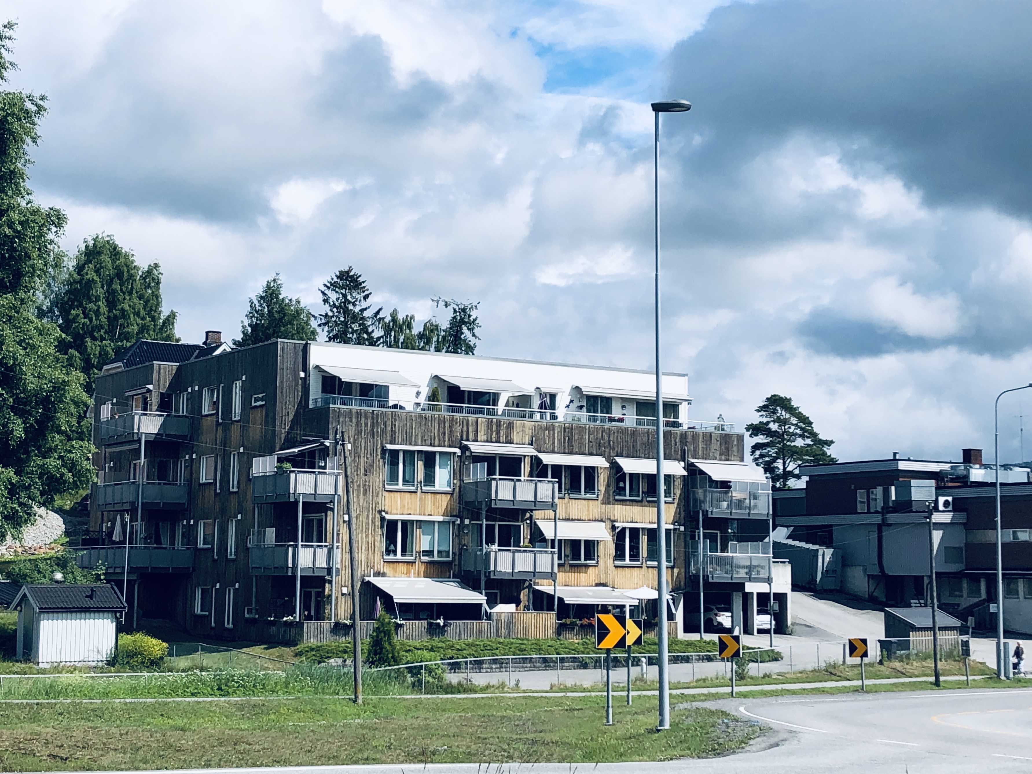 Hermanstien 2, Jevnaker